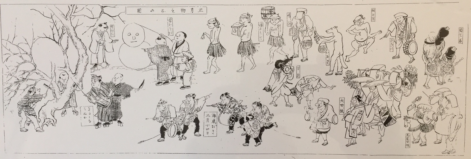 嘉永年間（1848-1854）二世十遍舎一九による「仙台年中行事絵巻」正月風俗から